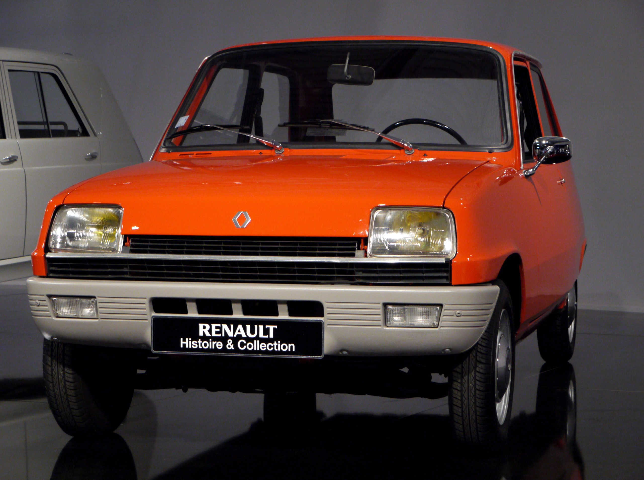 1973 Renault 5 TL. Spec.: - 4 cyl. - 956 cc - 44 bhp - 4 speed manual gearbox